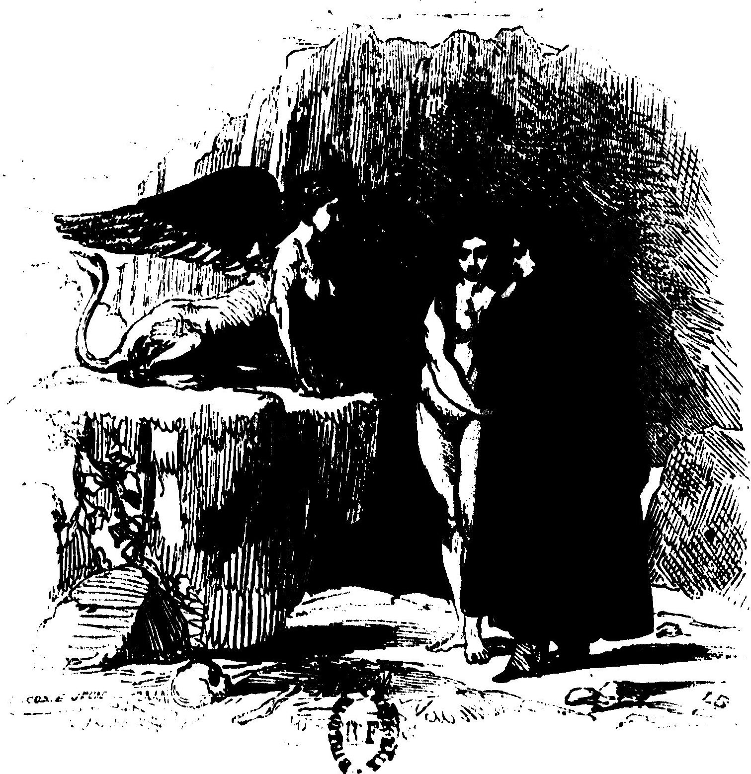 Image du livre "La Comédie de la mort" de Gautier